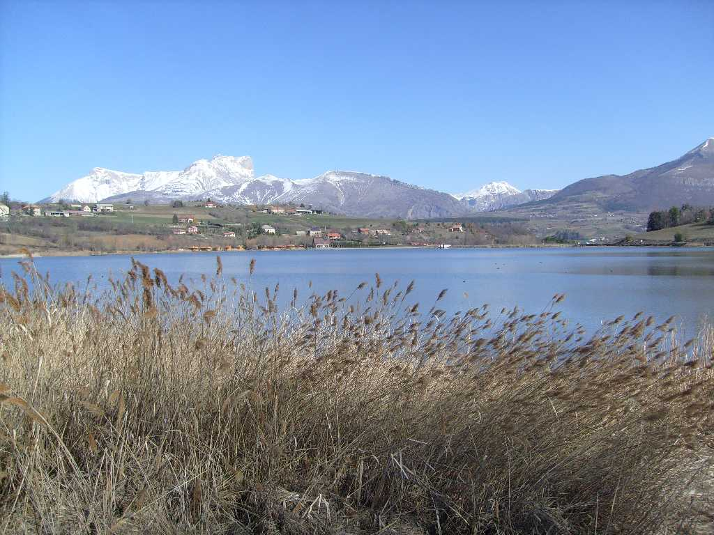 Le lac de Pelleautier, au fond le Dévoluy( Hautes-Alpes).